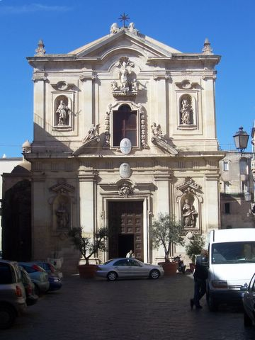 Dom San Cataldo in Tarent